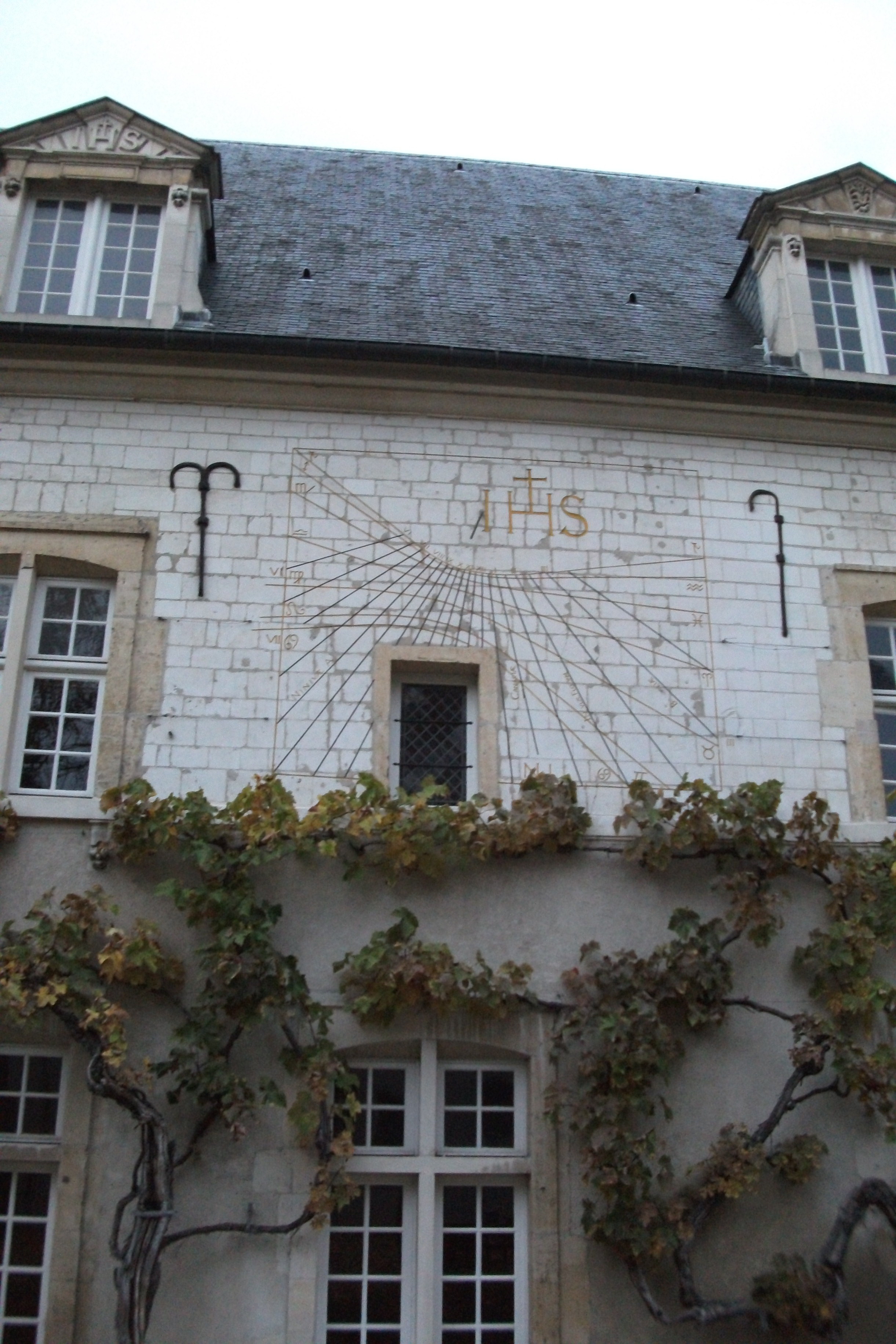 Cour et Cadran solaire de l'ancient collège des Jésuites.